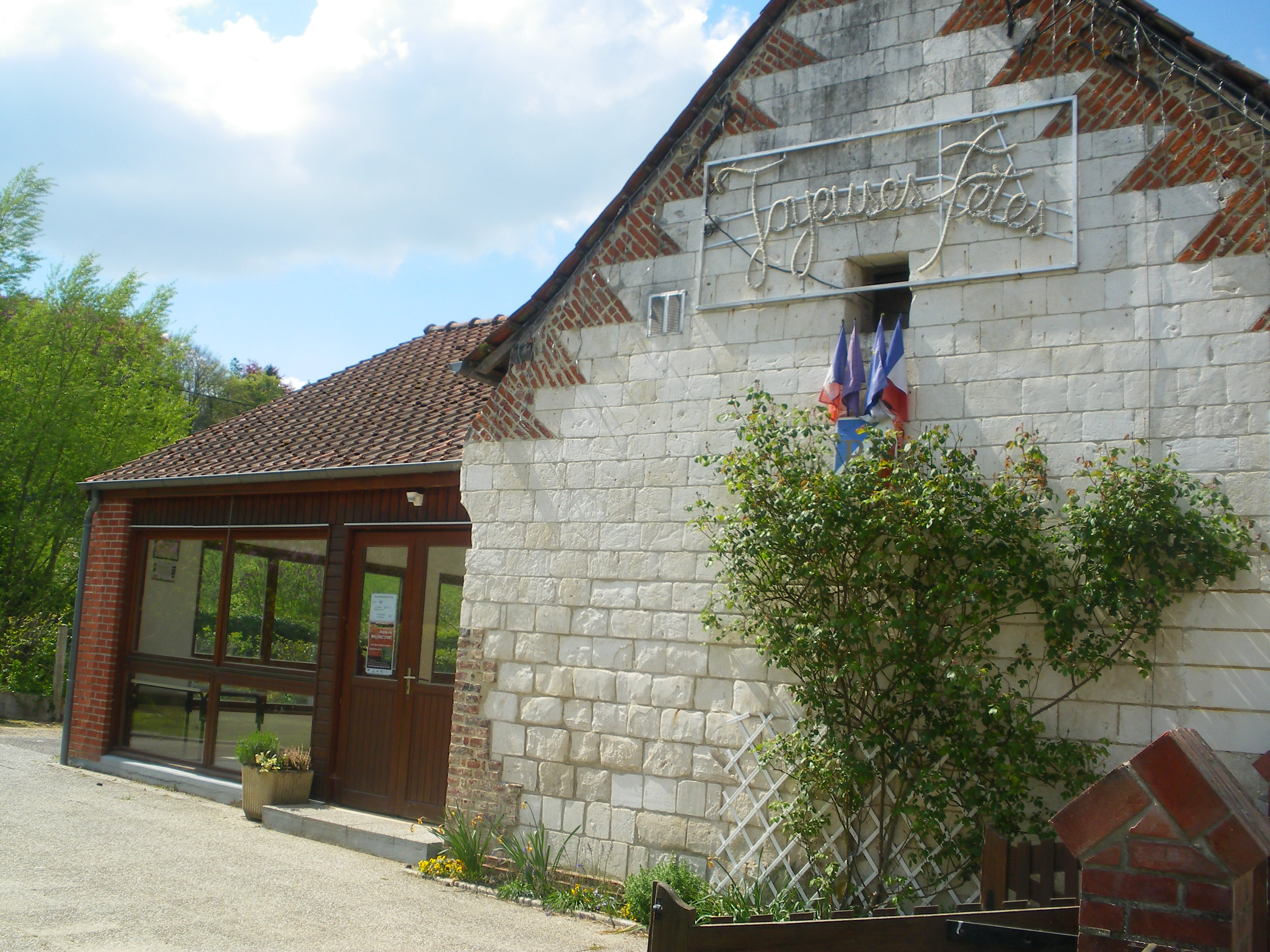 Vue de la mairie de Willencourt.